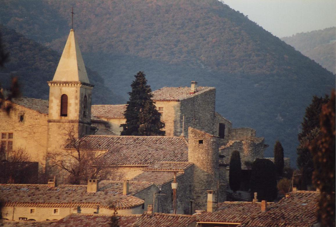 Vue de vieux village du Pègue - France